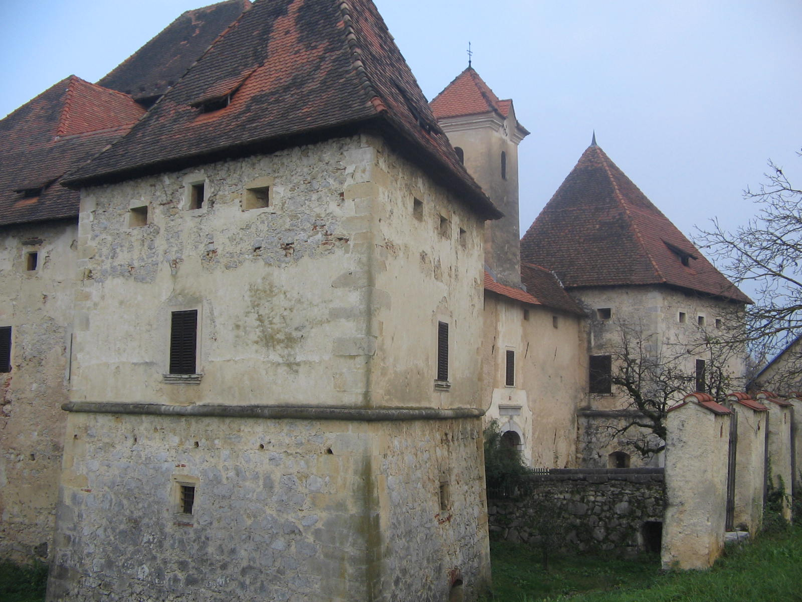 Gracarjev turm Castle, Slovenija, nahe Šentjernej, Slovenija Quelle: eigene Aufnahme 9. Nov. 2005 Fotograf: Janez Novak, Ljubljana, Slovenija